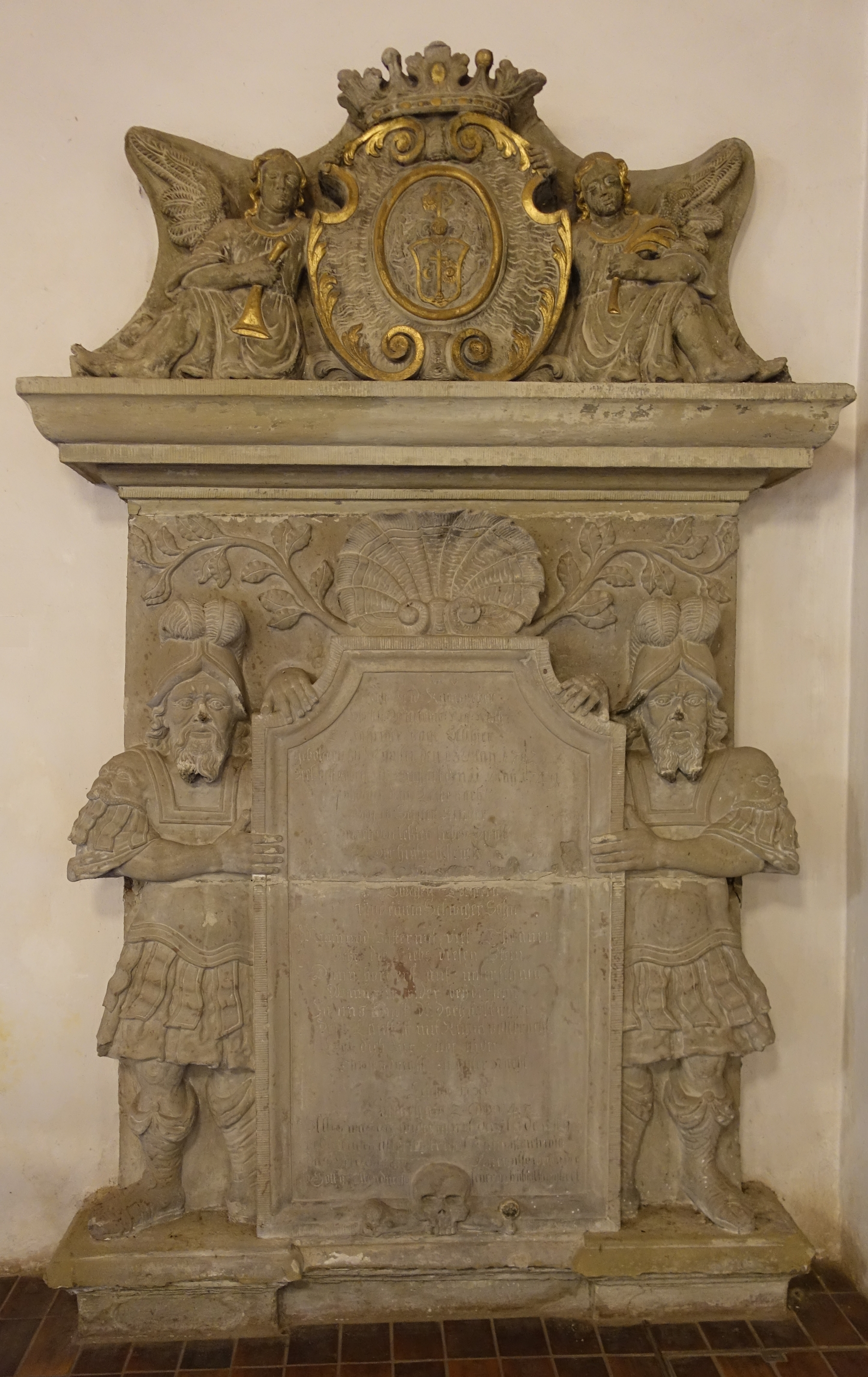 Epitaph an der Westwand in der Uffkirche auf dem Uff-Kirchhof in Stuttgart-Bad Cannstatt für den Cannstatter Regierungsrat, Hofgerichtsassessor und Vogt Johann Friedrich Rampacher (1702–1749).